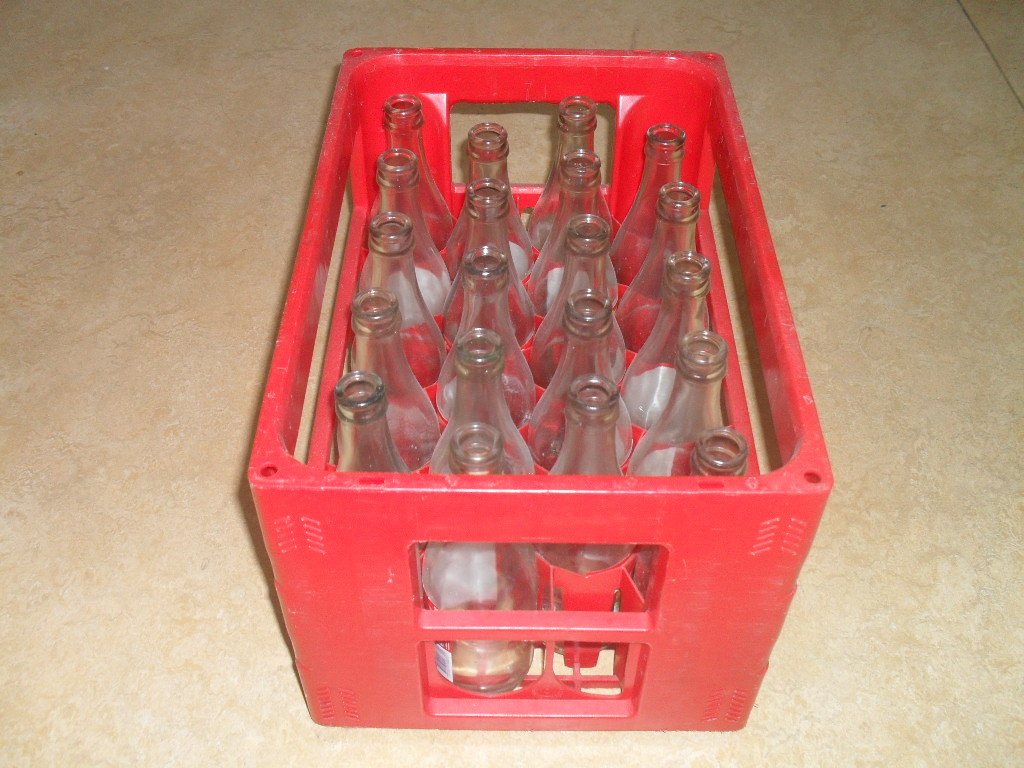 En back med julmust